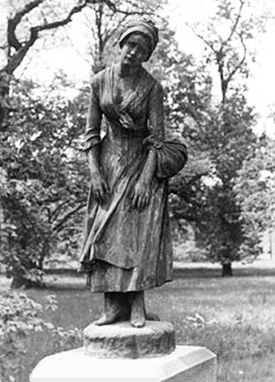 Bronzestatue „Manon Lescaut“ im Palmengarten Leipzig, 1942 im Rahmen der Metallspende des deutschen Volkes eingeschmolzen.